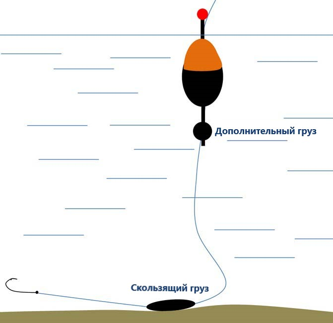 Схема донки с поплавком